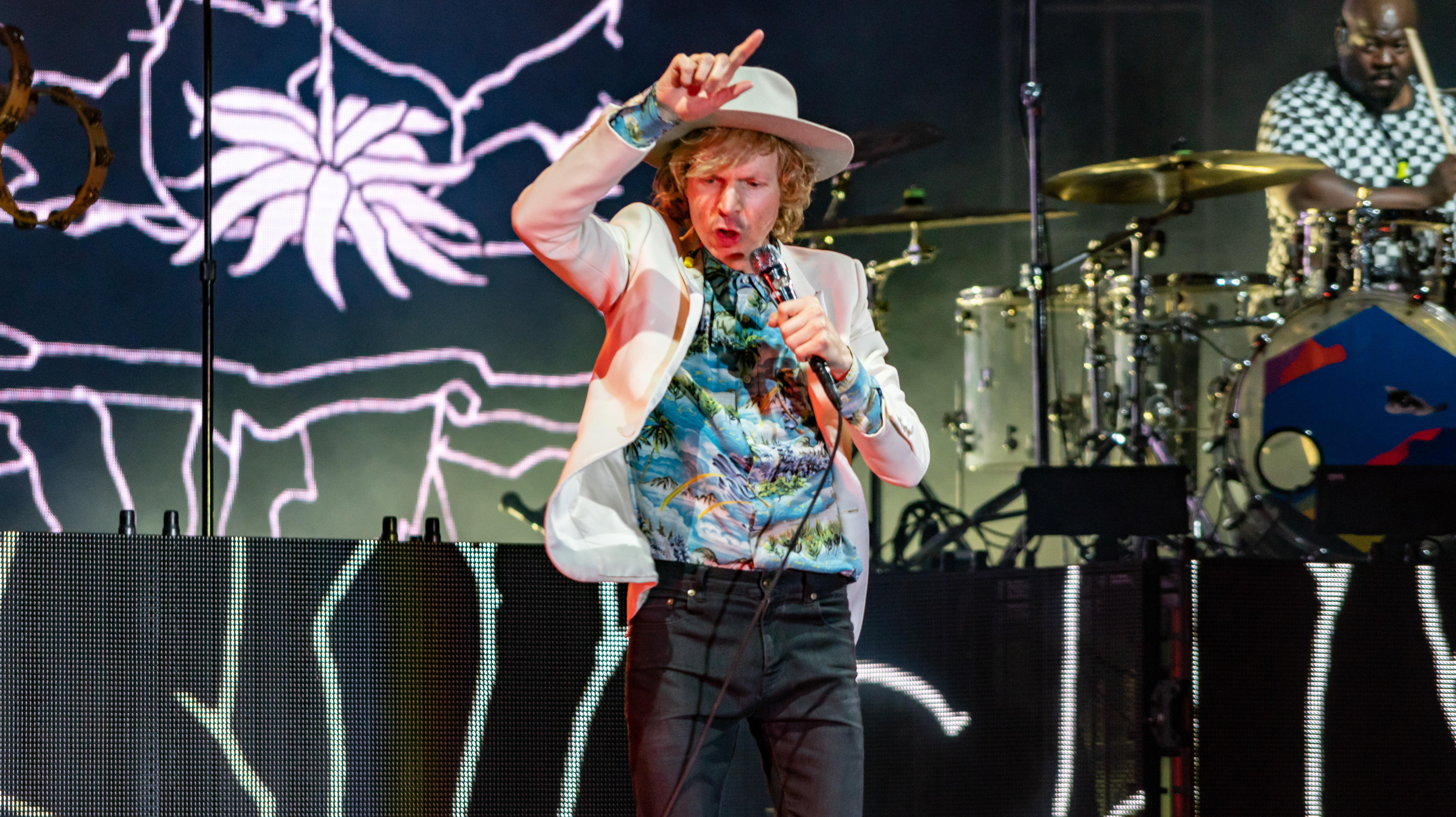 OhanaSep18-194